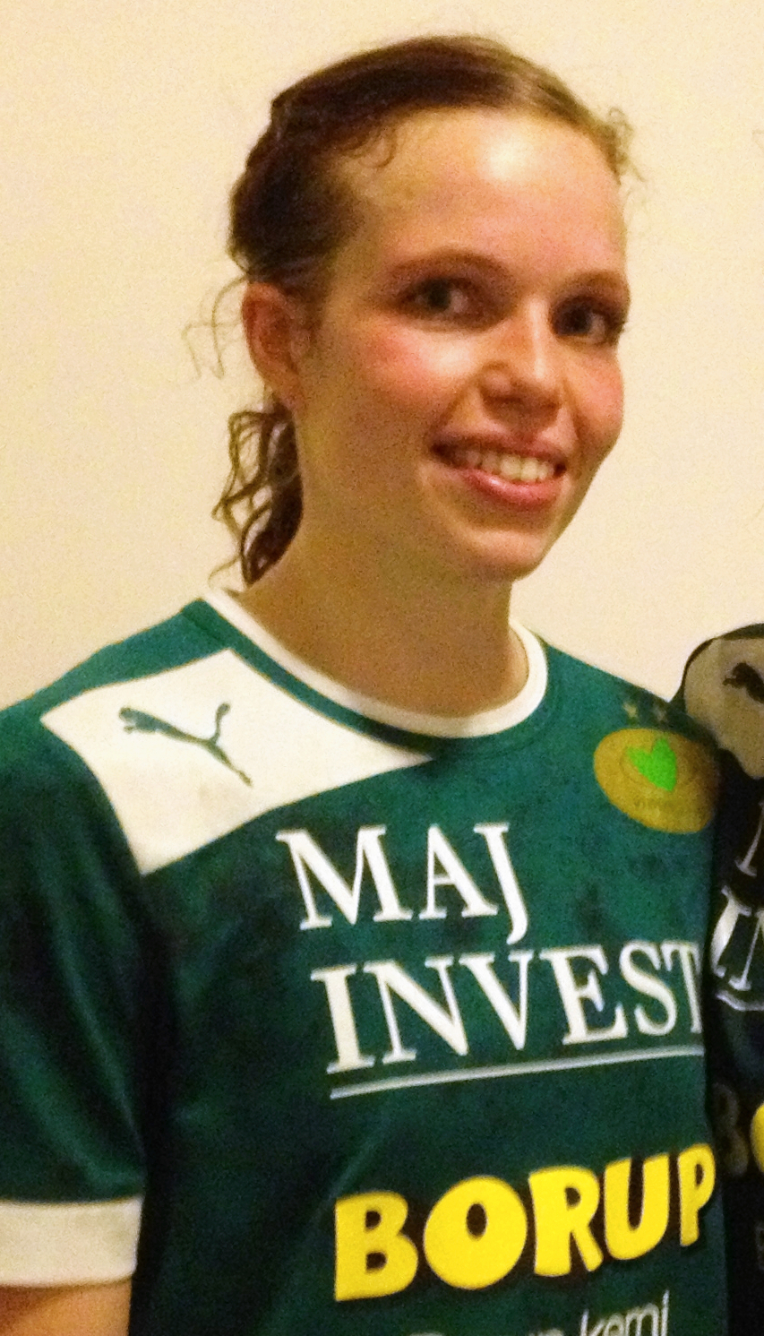 Håndboldspilleren Louise Lyksborg fra Viborg HK Her efter en kamp i Viborg Stadionhal.